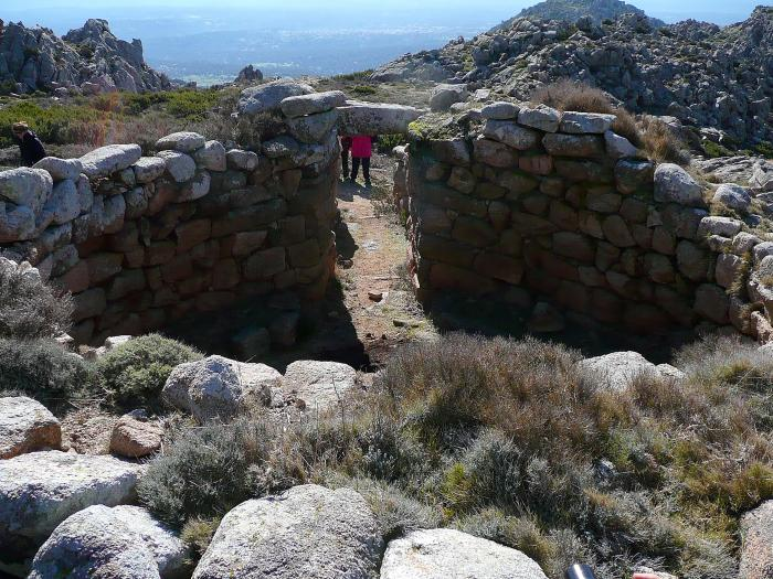 Tempio di Sos Nurattolos